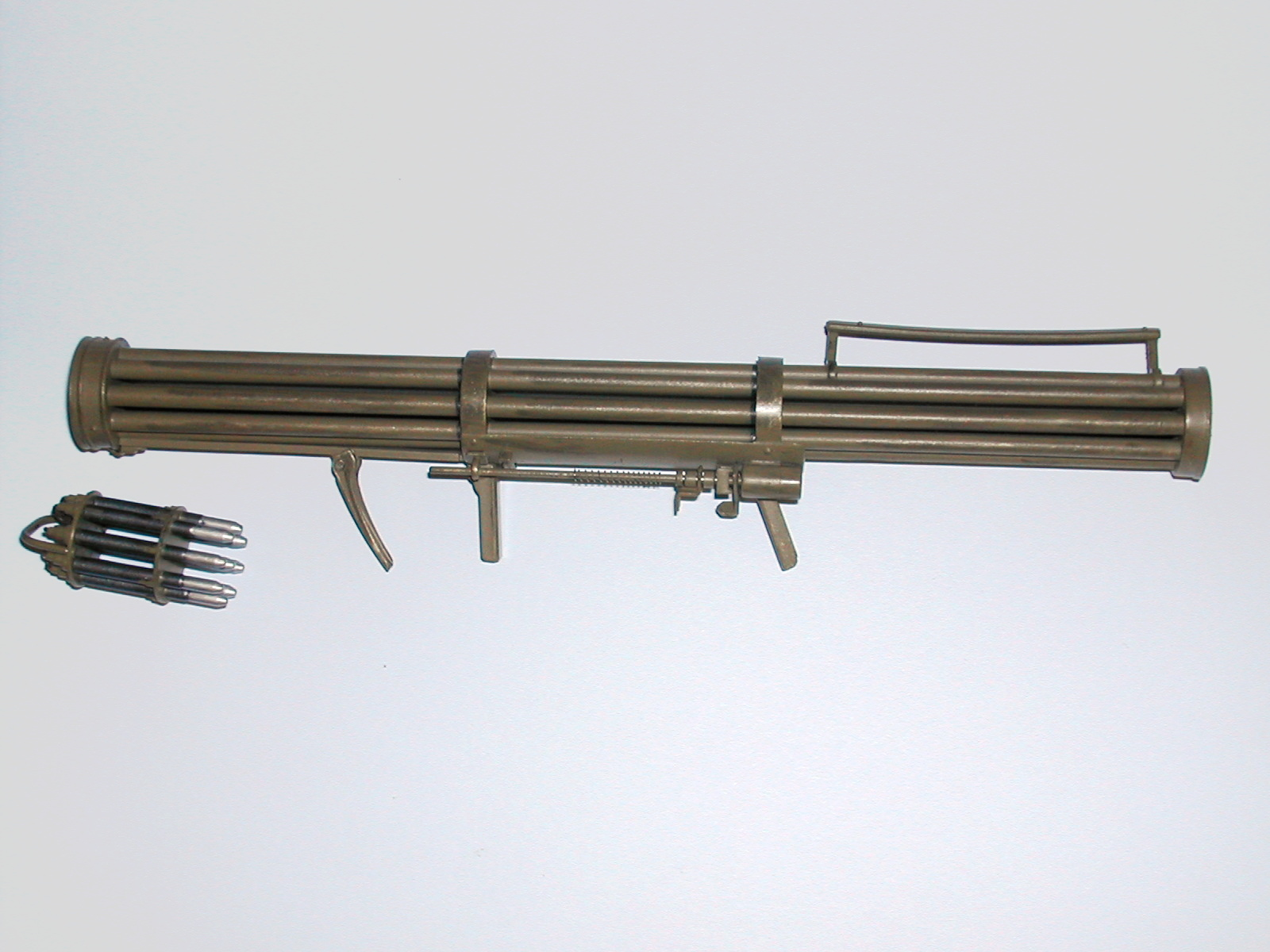 Photo perso d'une réplique au 1/6°